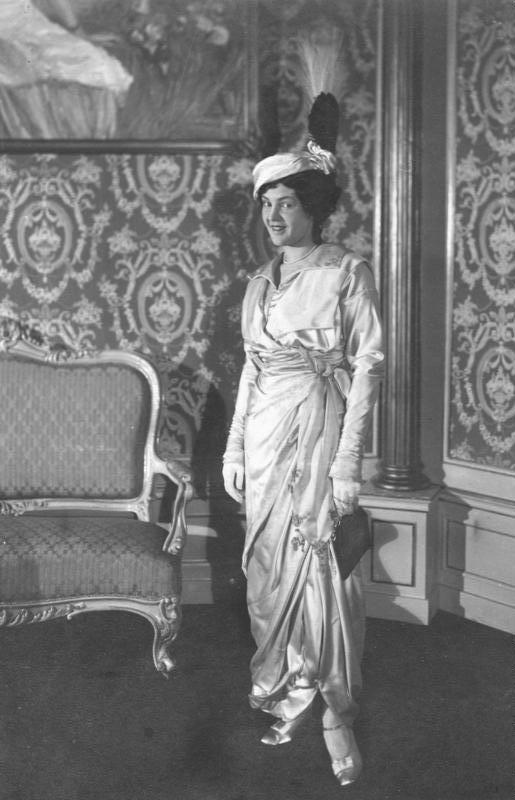 Leopoldine Konstantin Leopoldine Konstantin in dem Lustspiel "Schöne Frauen" von Etienne Rey. Aufführung in den Kammerspielen 1419 13